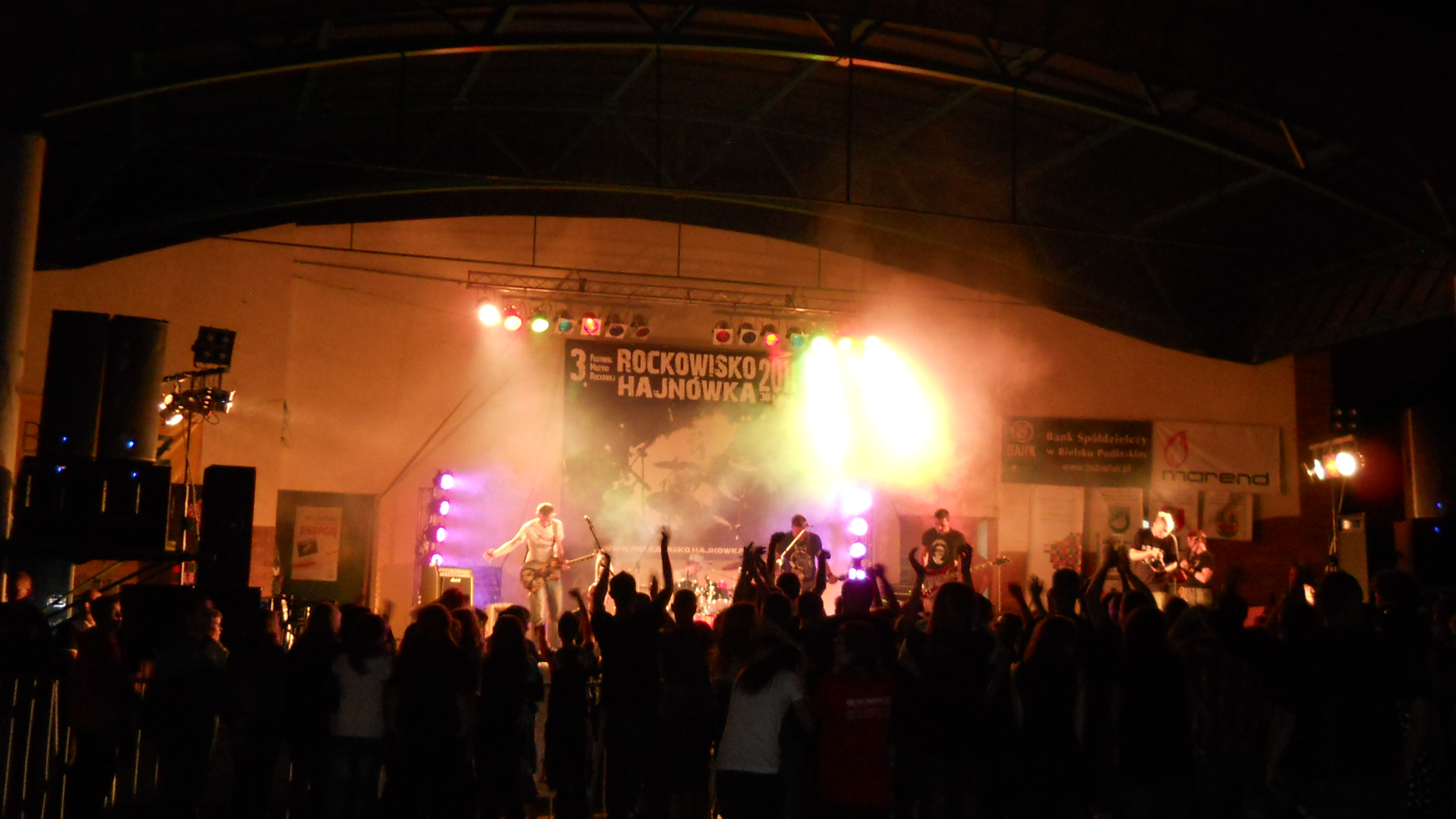 B.N. (Biaz nazwy) – białoruski zespół muzyczny na festiwalu Rockowisko Hajnówka 2011 .